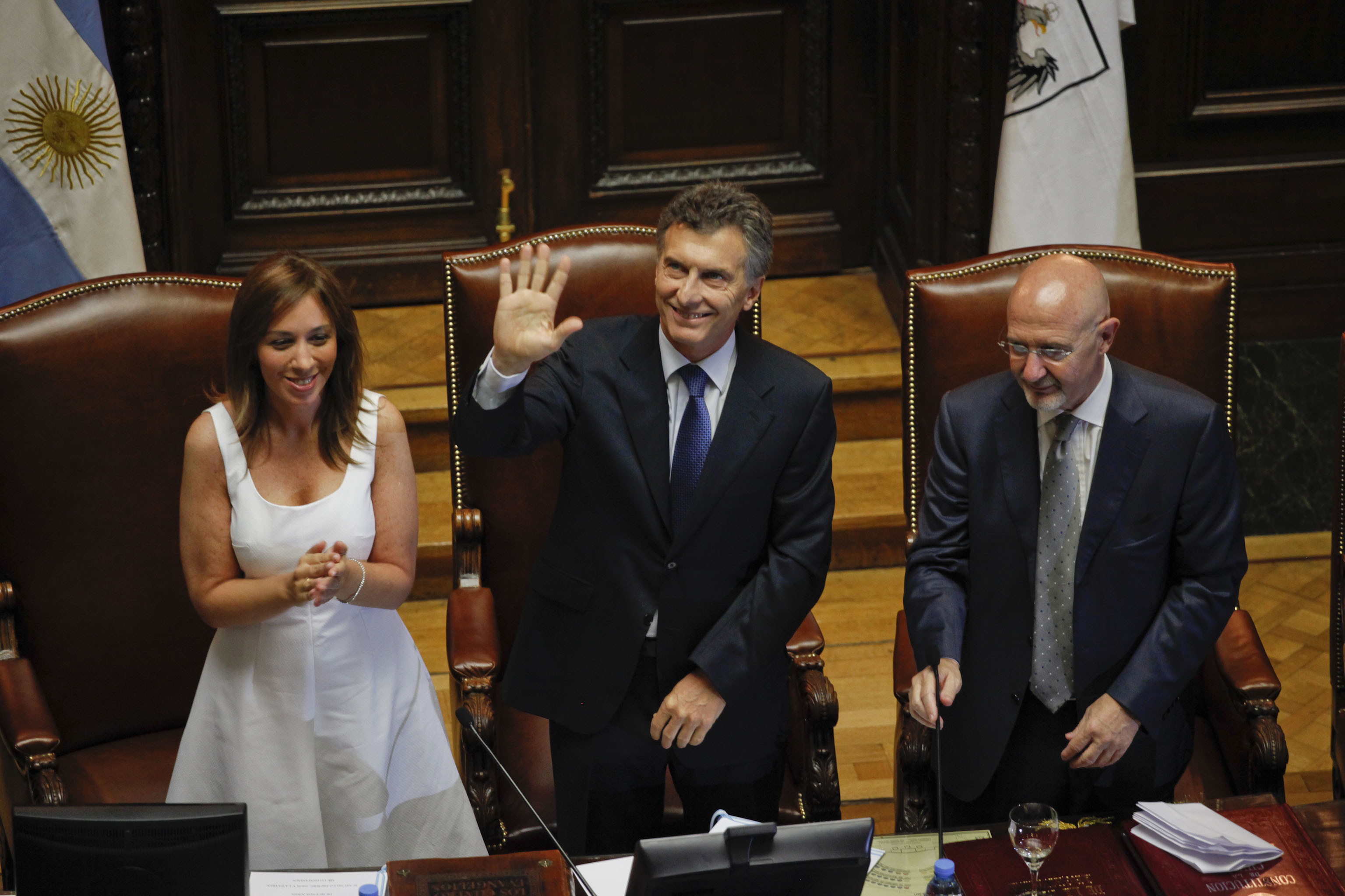 El flamante Jefe de Gobierno porteño, Mauricio Macri y su vice jefa, Maria Eugenia Vidal, durante la ceremonia de jura en la Legislatura de la Ciudad. Foto Sandra Hernandez-gv/GCBA.